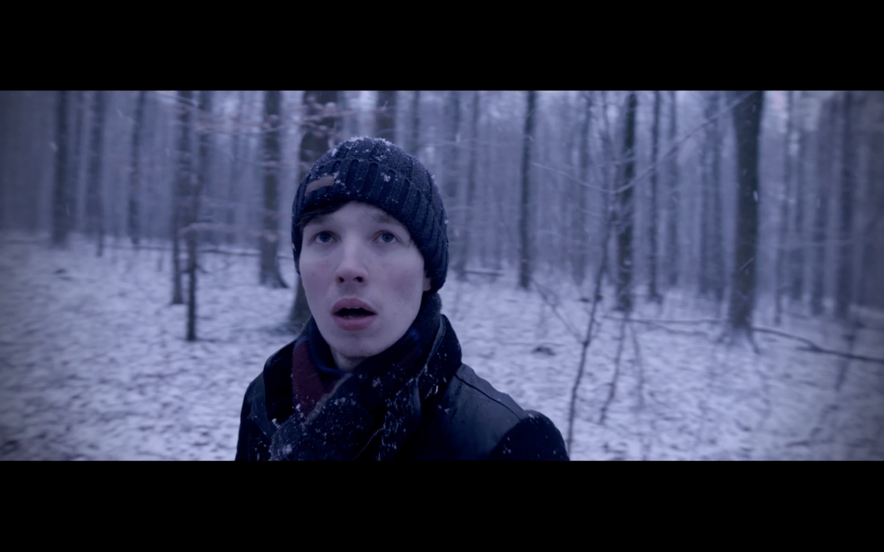 Andy Georg Bill Balduin (Yannic Lippe) in „Der Student von Bochum“